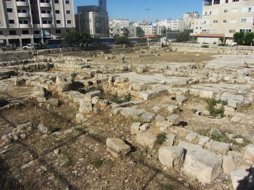 אלוני ממרא - אתר ארכיאולוג